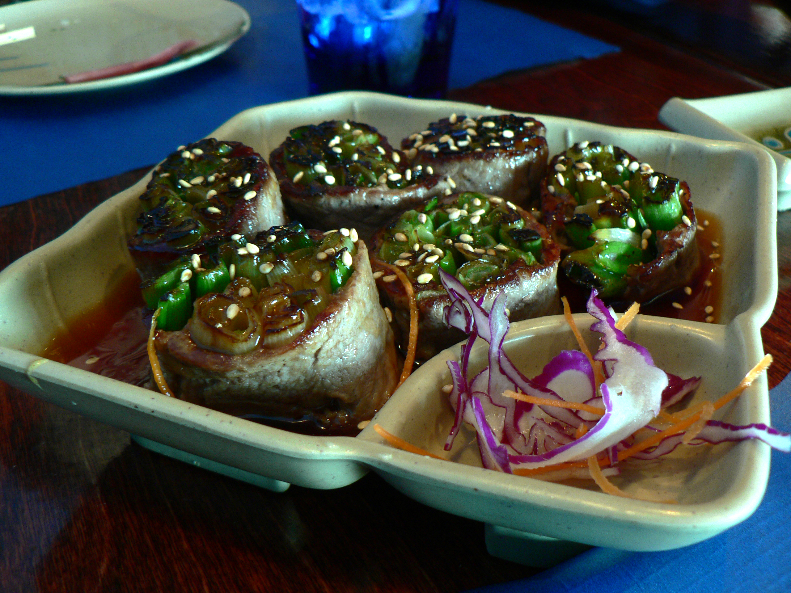 beef negimaki